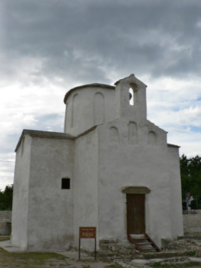 Na obrázku je kostel sv. Kříže, který se nachází v chorvatském městě Nin.